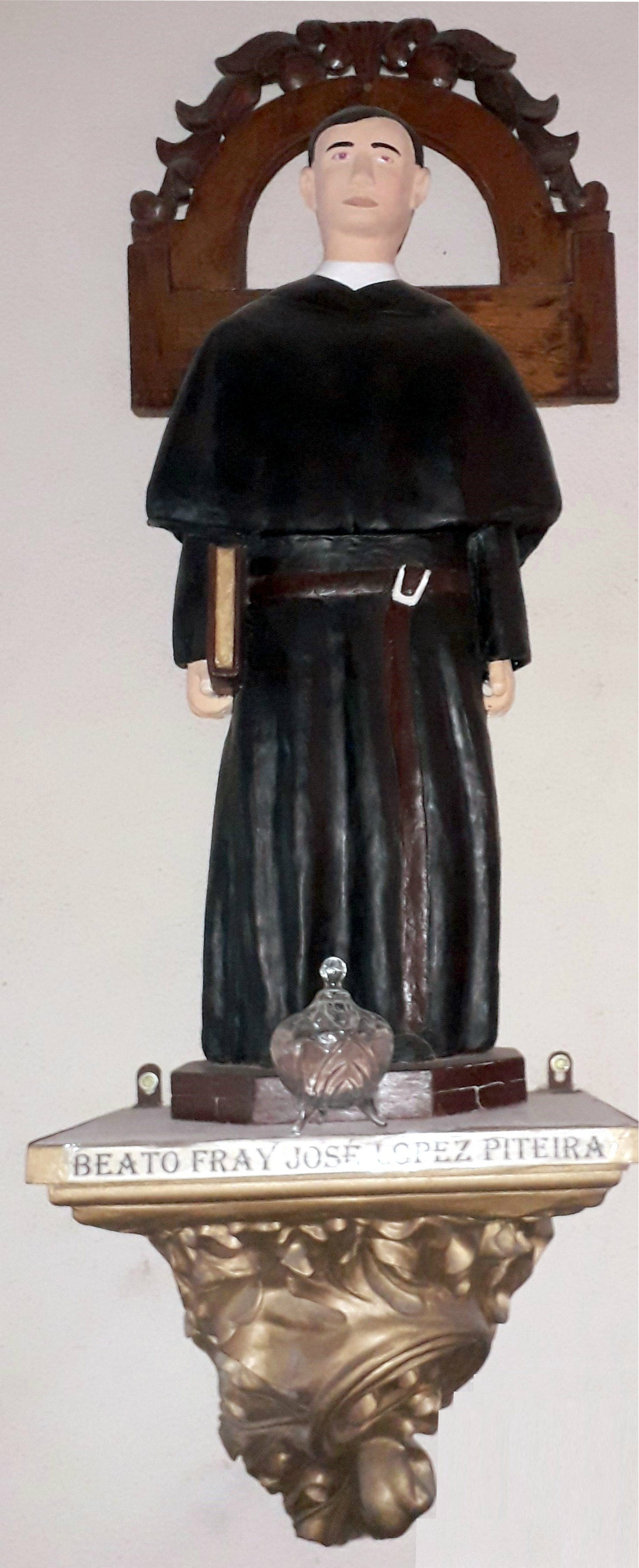 Altar del Beato José López Piteira, en su natal parroquia de San José de Jatibonico y Arroyo Blanco en Cuba.